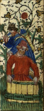 Détail de l'enluminure du manuscrit des Heures de Toul, atelier messin du XVe siècle. Pressurage du raisin.